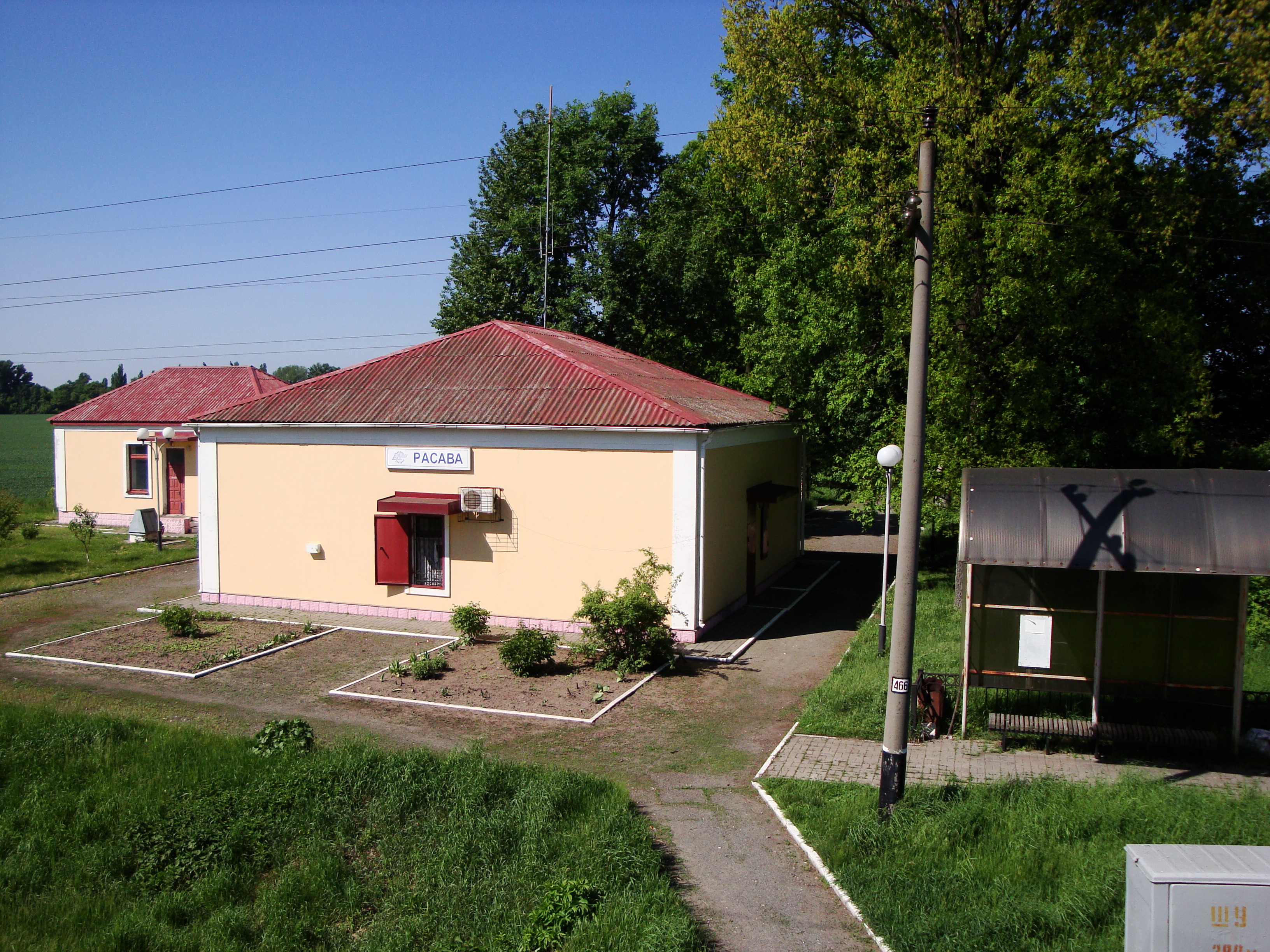 Станція Расава